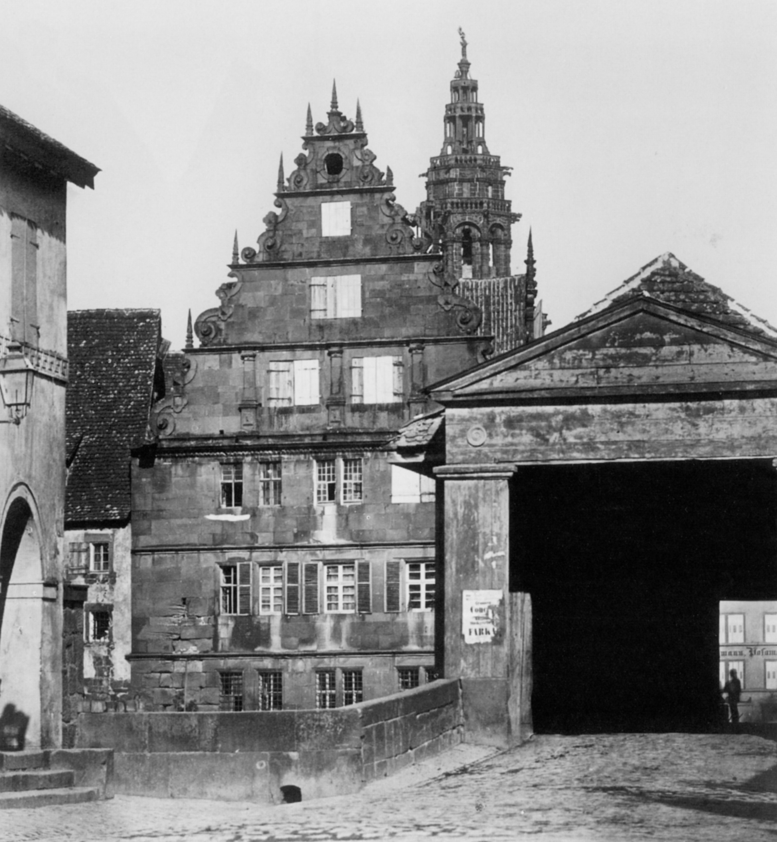 Pfründnerhaus des Katharinenspitals in Heilbronn, 1865. Rechts am Bildrand die hölzerne Neckarbrücke, die weiter nördlich durch die neue Neckarbrücke ersetzt wurde, wofür die Wirtschaftgebäude des Katharinenspitals bereits 1866 abgerissen wurden. Die Kirche selbst und die restlichen Spitalgebäude wurden 1871 abgerissen.